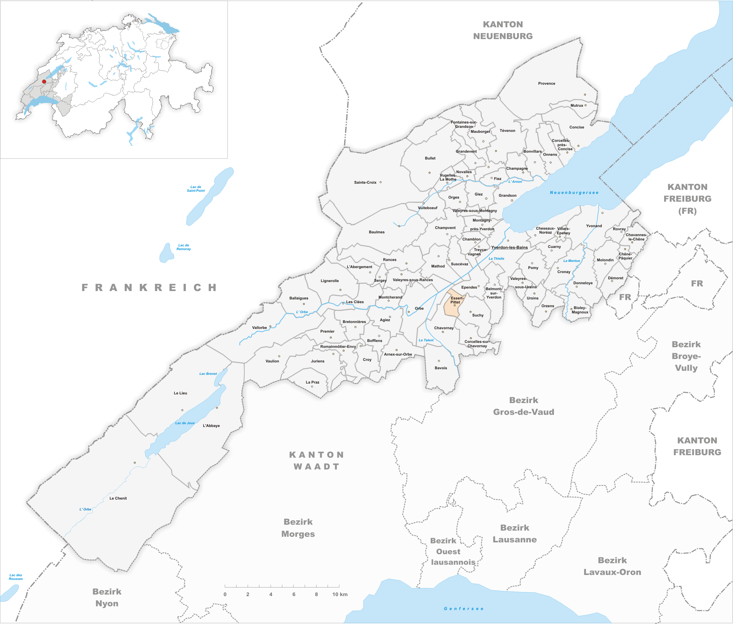 Municipality Essert-Pittet